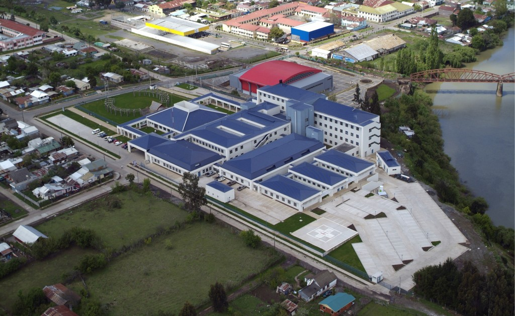 Hospital de Imperial